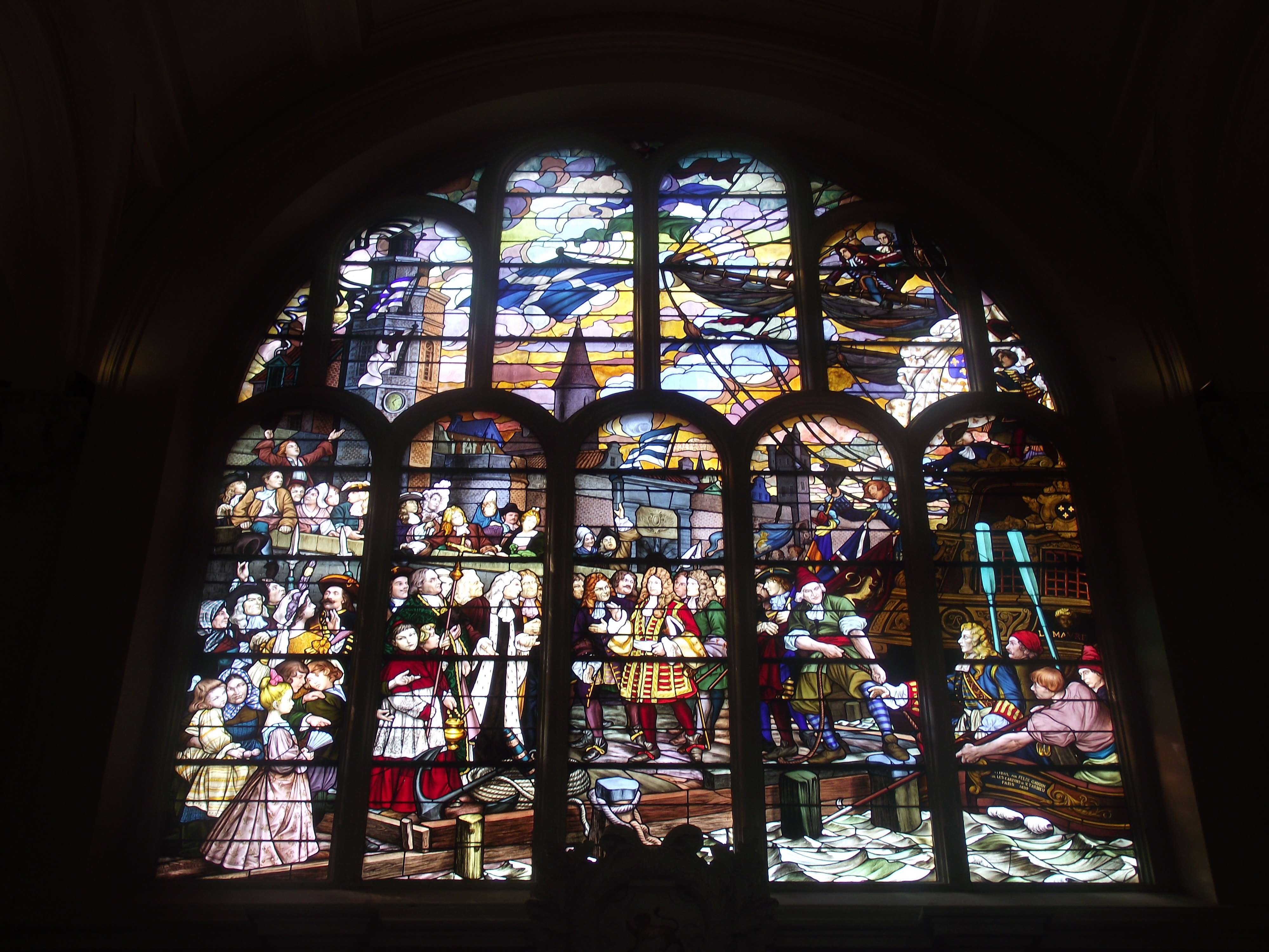 Vitraux représentant Jean Bart lors de son retour de la bataille du TEXEL à Dunkerque, figurant à l'intérieur de l'hôtel de ville de Dunkerque.